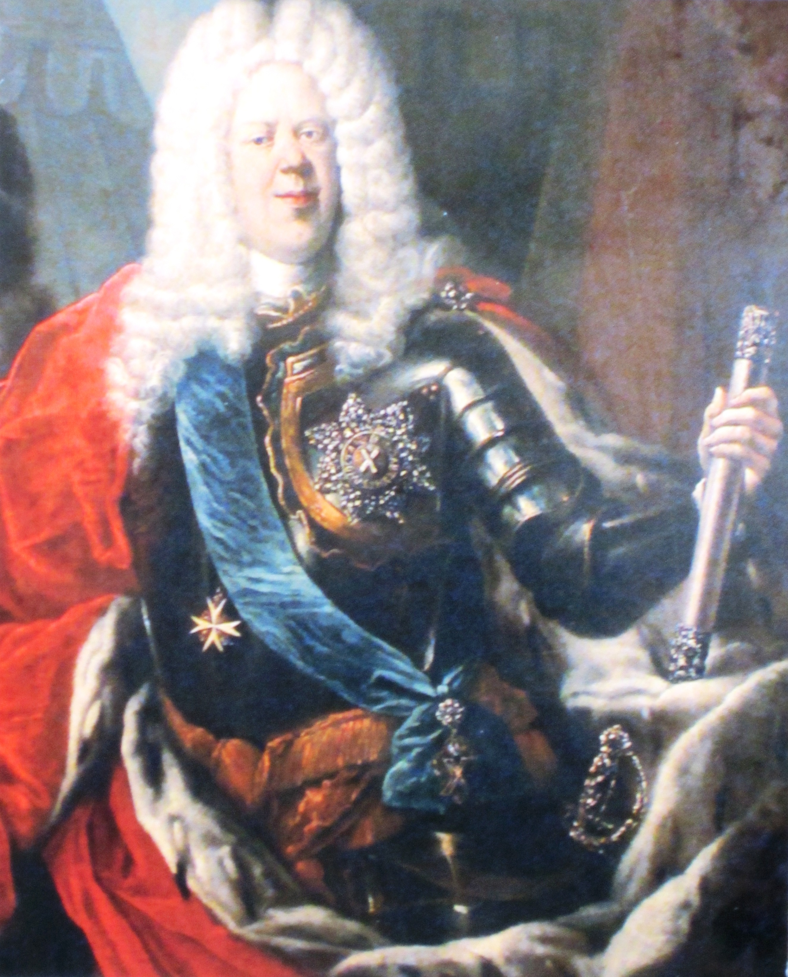 Herzog Ludwig Rudol von Braunschweig-Wolfenbüttel (1671–1735)